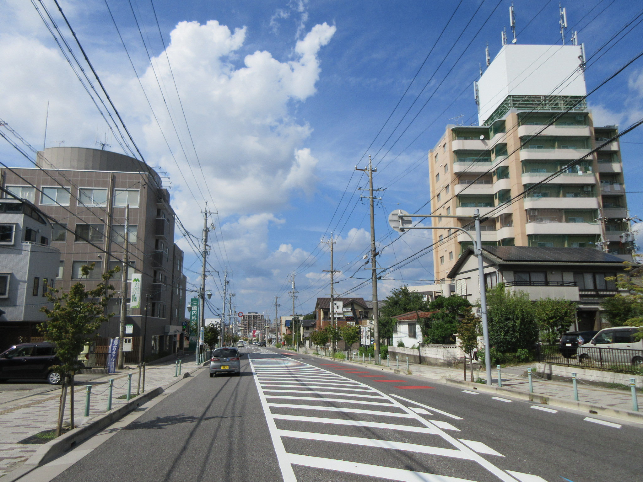 愛知県道477号東大見岡崎線。岡崎市六供町にて撮影。